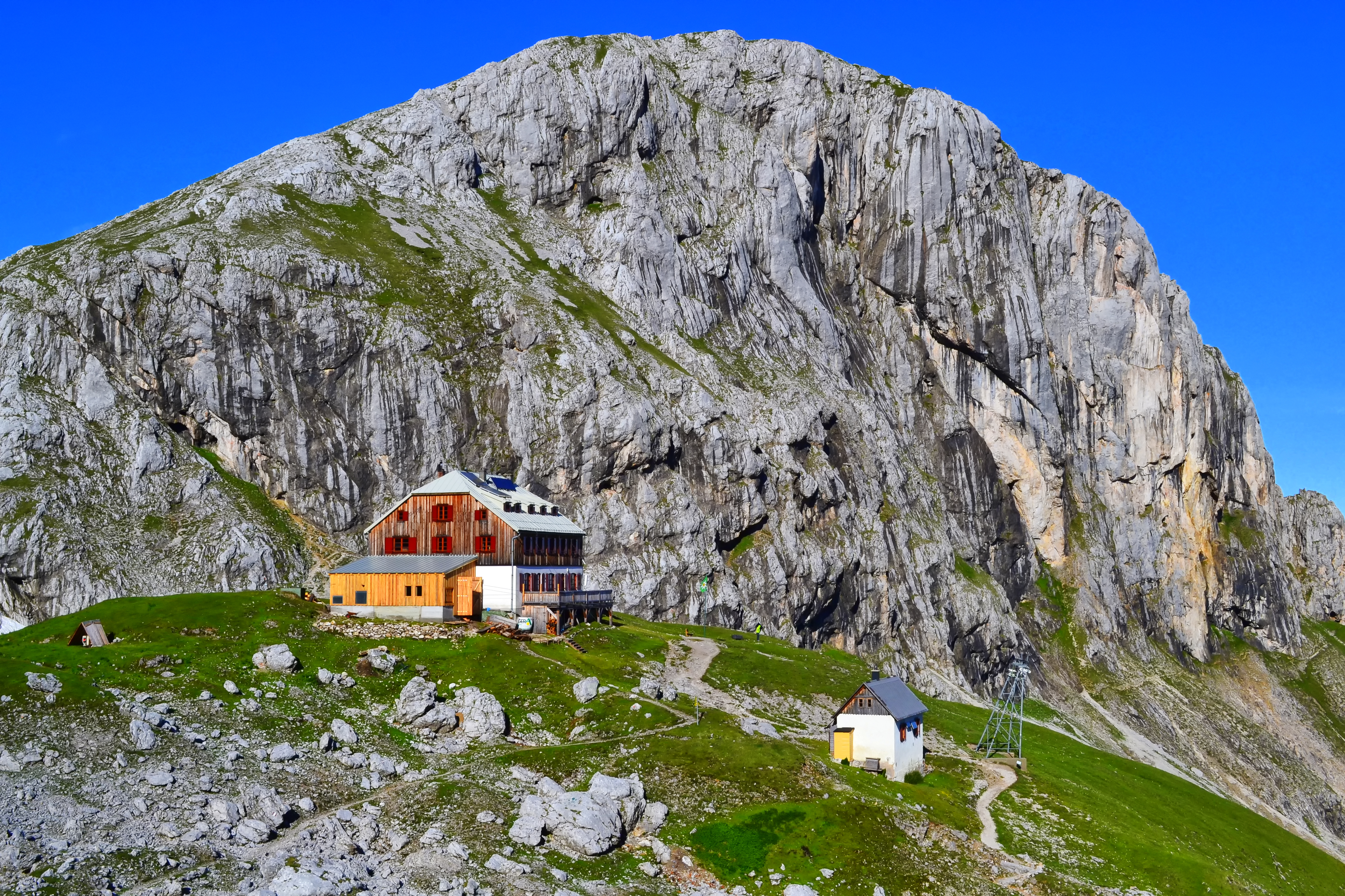 Das Guttenberghaus mit dem Hausberg Sinabell im Hintergrund. Der Berg ist zu Fuß oder auch über einen Klettersteig mit der Schwierigkeit B bis luftiges C erreichbar. Abstieg erfolgt über den Rücken des Sinabells.